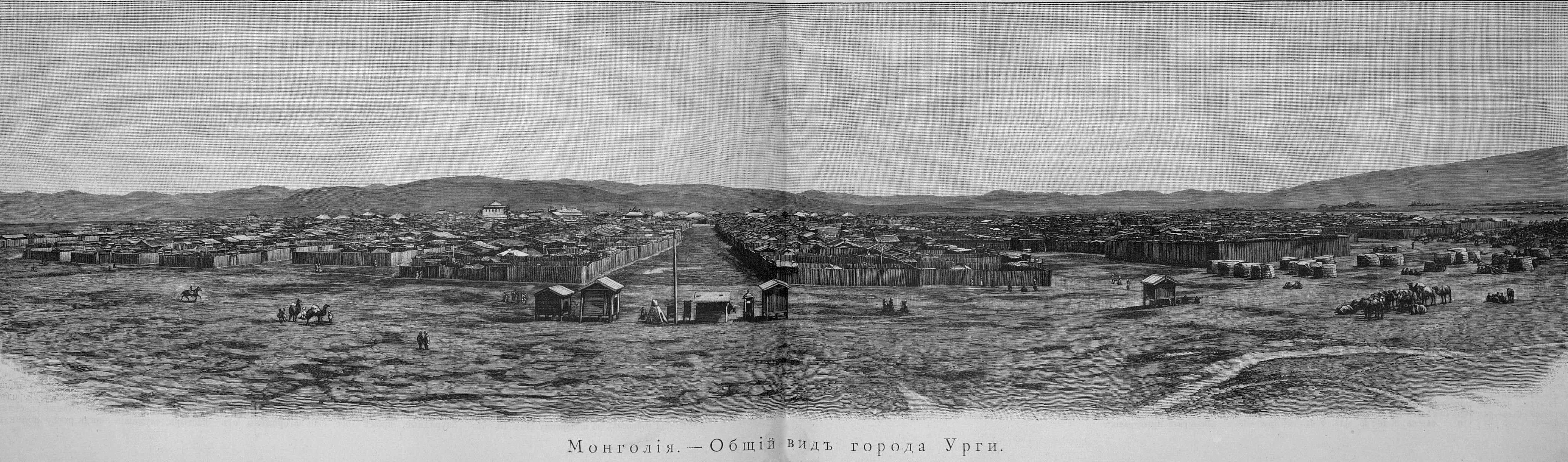 Урга, 1888 год